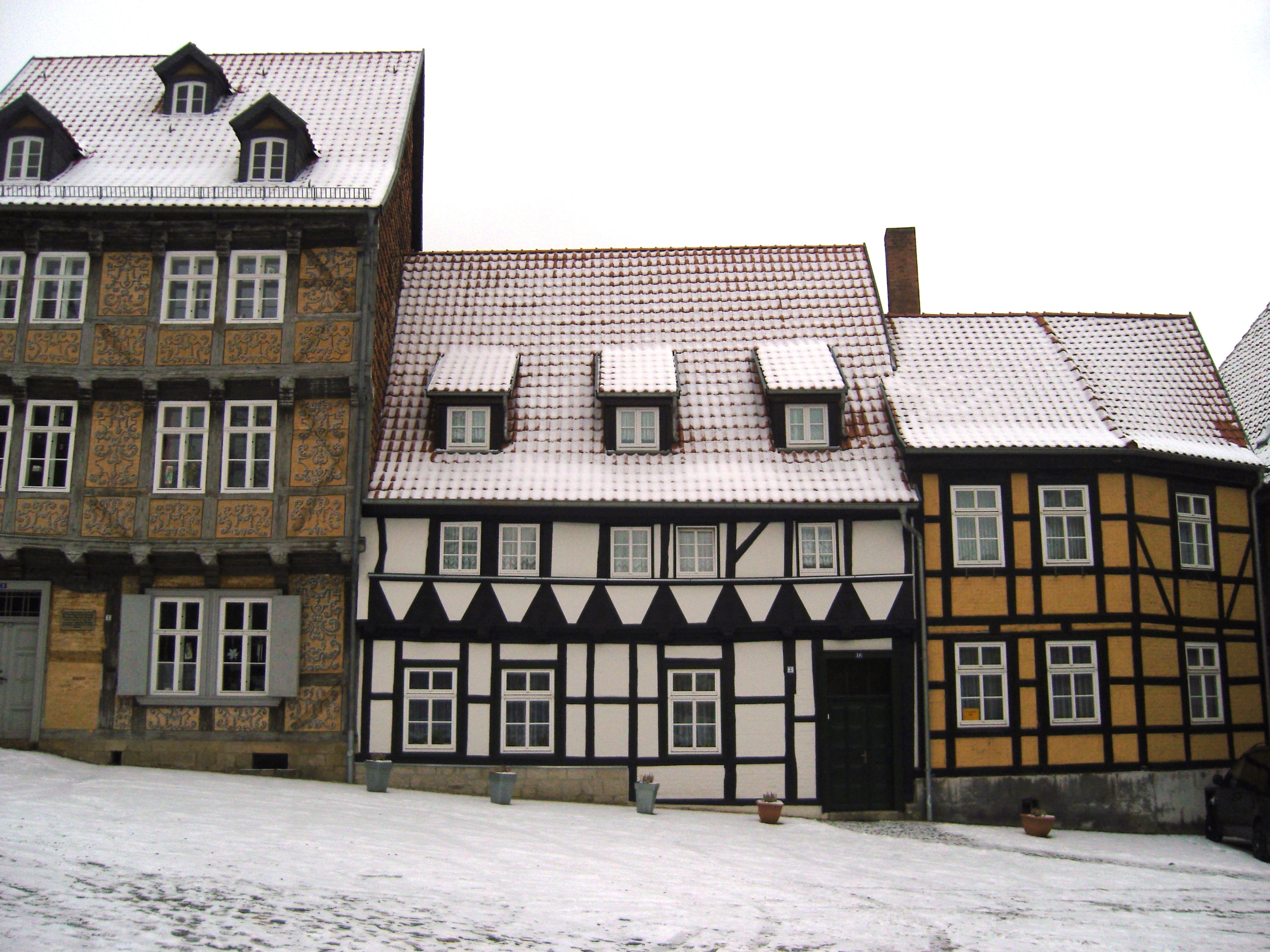 Denkmalgeschütztes Wohnhaus Schloßberg 10 in Quedlinburg